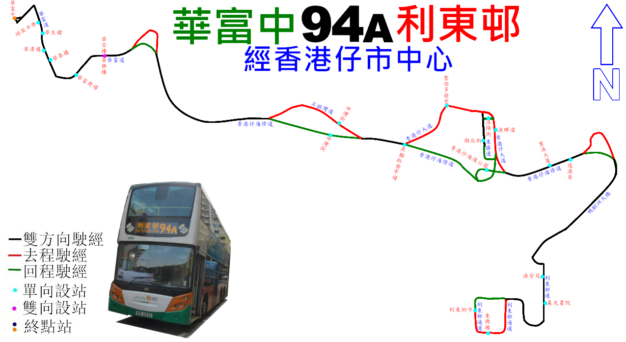 中文（香港）: 新巴94A線的走線圖